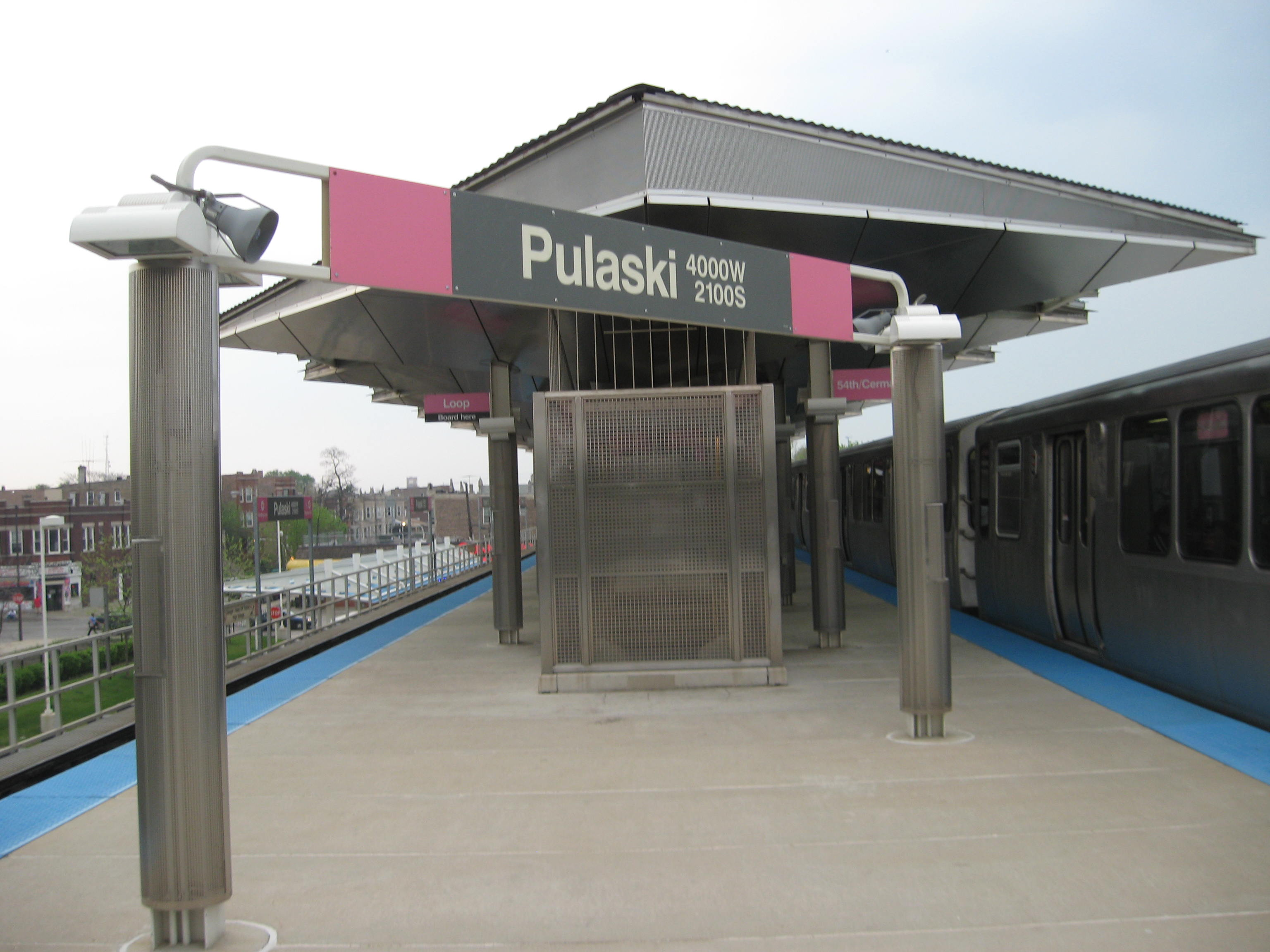 Pulaski CTA Pink Line